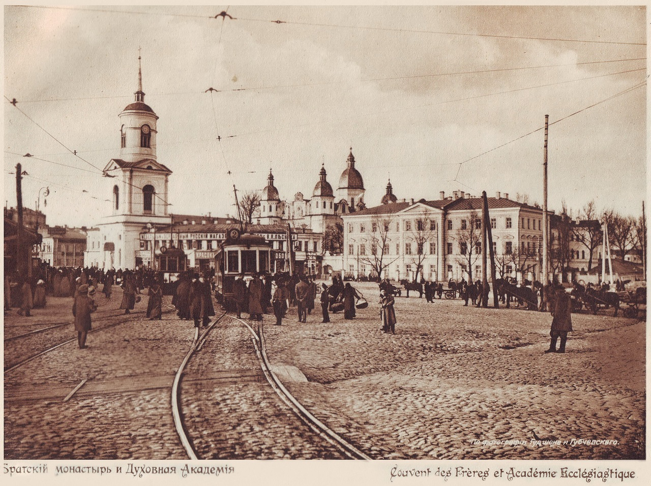 Братський монастир та Духовна Академія Київ (Brotherhood Monastery Kyiv) 1911